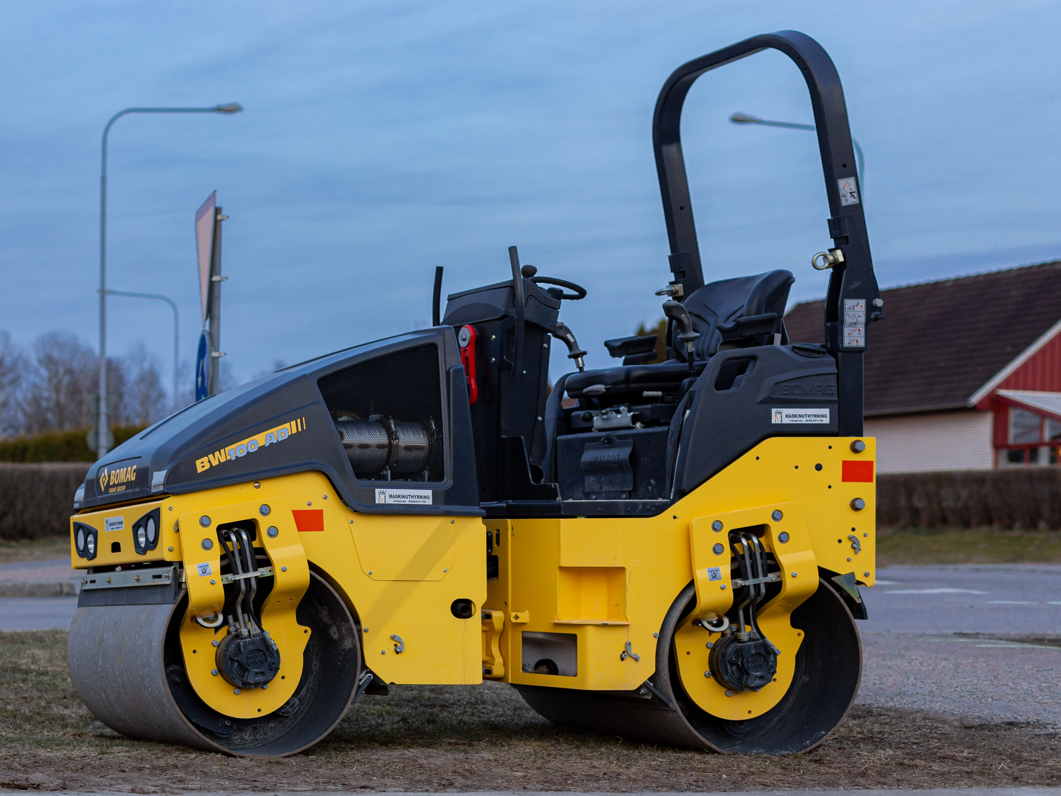 BOMAG BW100AD. Avesta, Dalarnas län, Sverige.